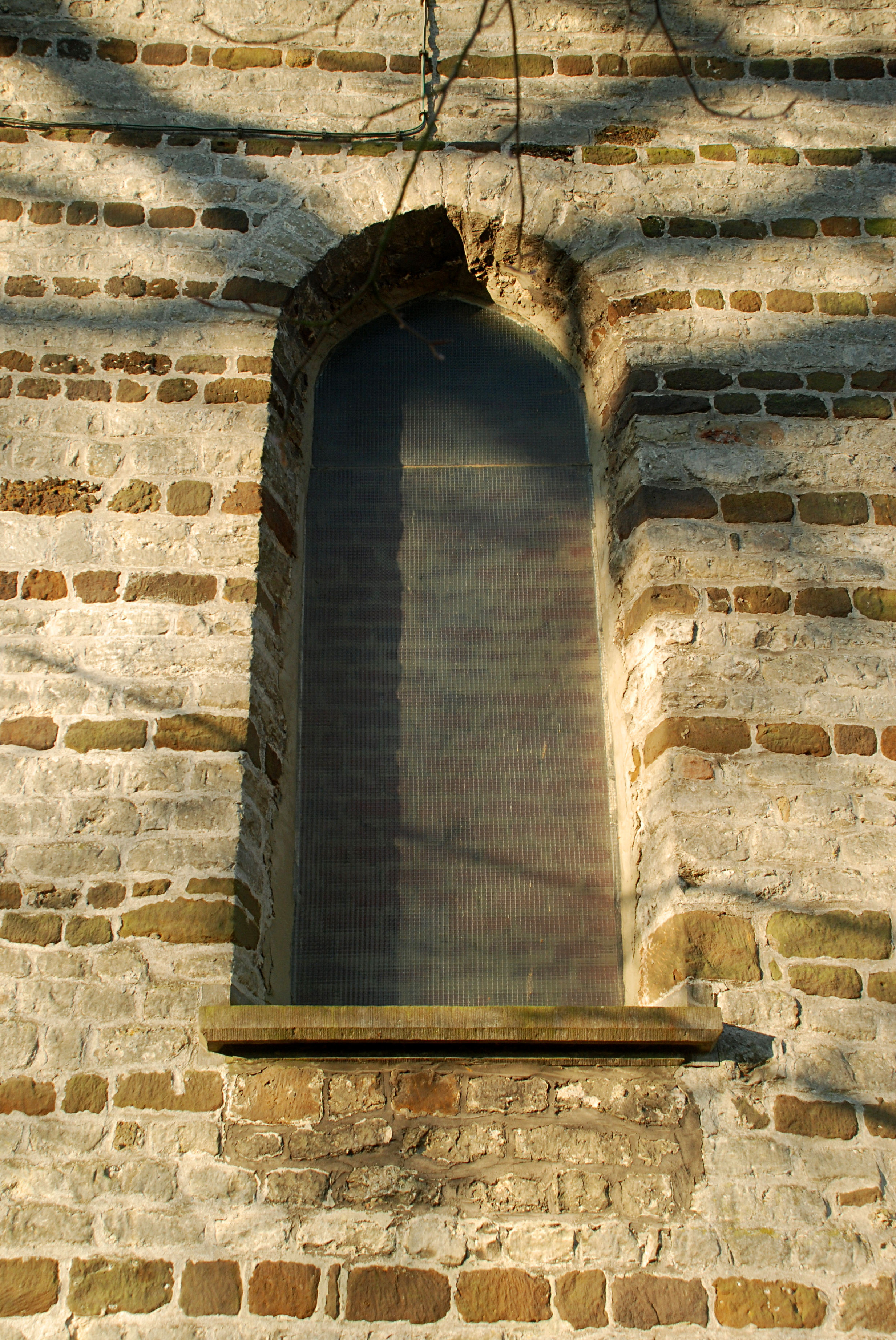 Belgique - Brabant wallon - Chaumont-Gistoux - Église Saint-Bavon de Chaumont